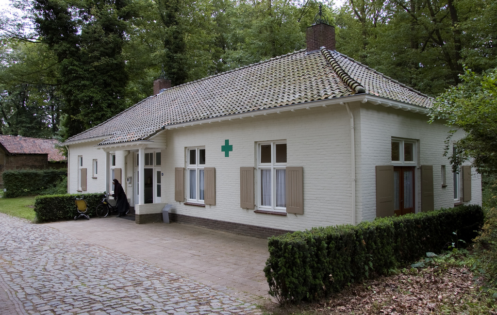 Groene Kruisgebouw, Wessem gemeente Heel, 1950-1960, 12.9 Groene Kruisgebouw, Wessem, 1950-1960